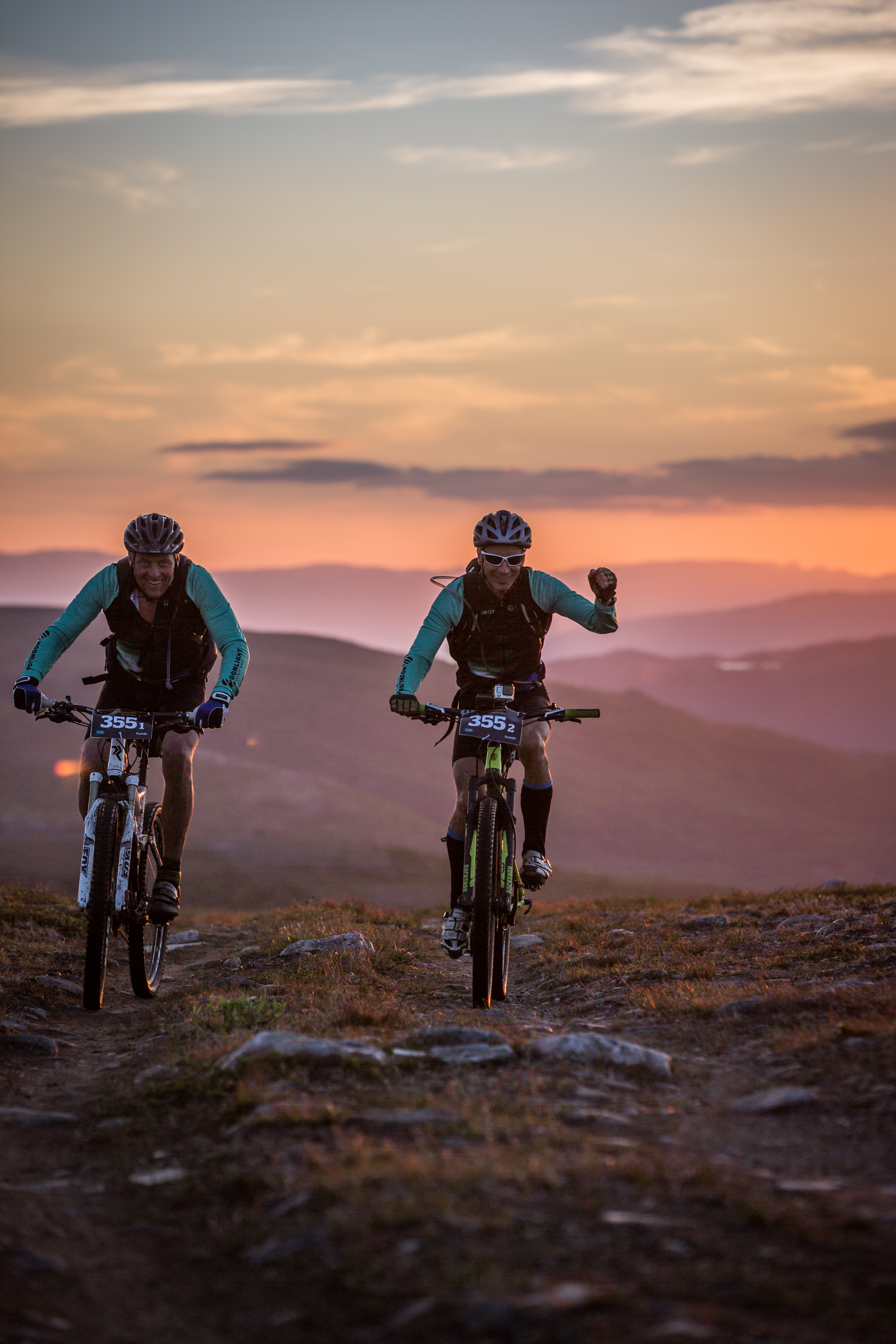 Offroad Finnmark 2016 Fotograf: Steinar Vik